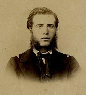 Le Léon estaba embarcado en el crucero Decres[1] y fue asignado el 26 de noviembre de 1880 por el capitán Chevalier, jefe de la división naval francesa del Pacífico, a un grupo de observadores neutrales que a nombre de los jefes de las fuerzas navales neutrales surtas en el Callao solicitaron y obtuvieron permiso del jefe de la primera división del Ejército de Chile, José Antonio Villagrán Correas, para acompañar y observar las operaciones militares chilenas. El interés no era solamente la teoría militar sino también respondía a la razón de su estancia en la costa americana, esto es, la protección de sus intereses y connacionales en la zona.[2]:3